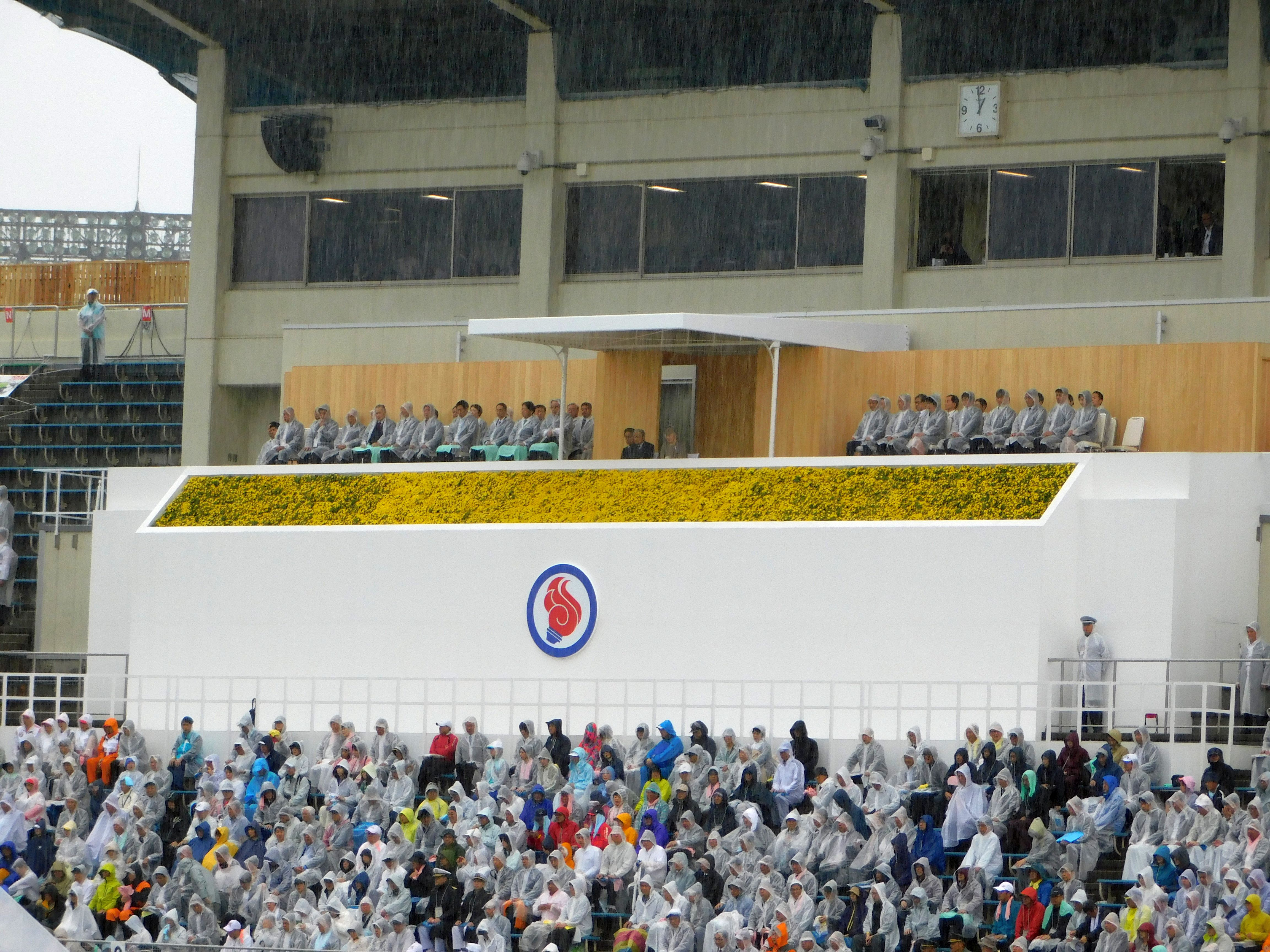 第73回国民体育大会の開会式、福井運動公園陸上競技場の貴賓席。